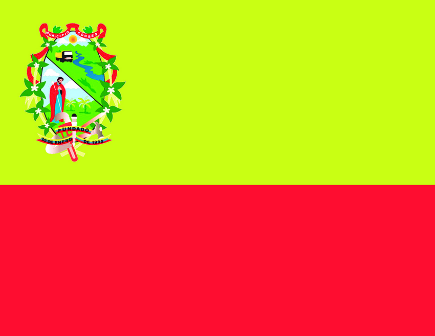 BAND-S-Torbes.svg